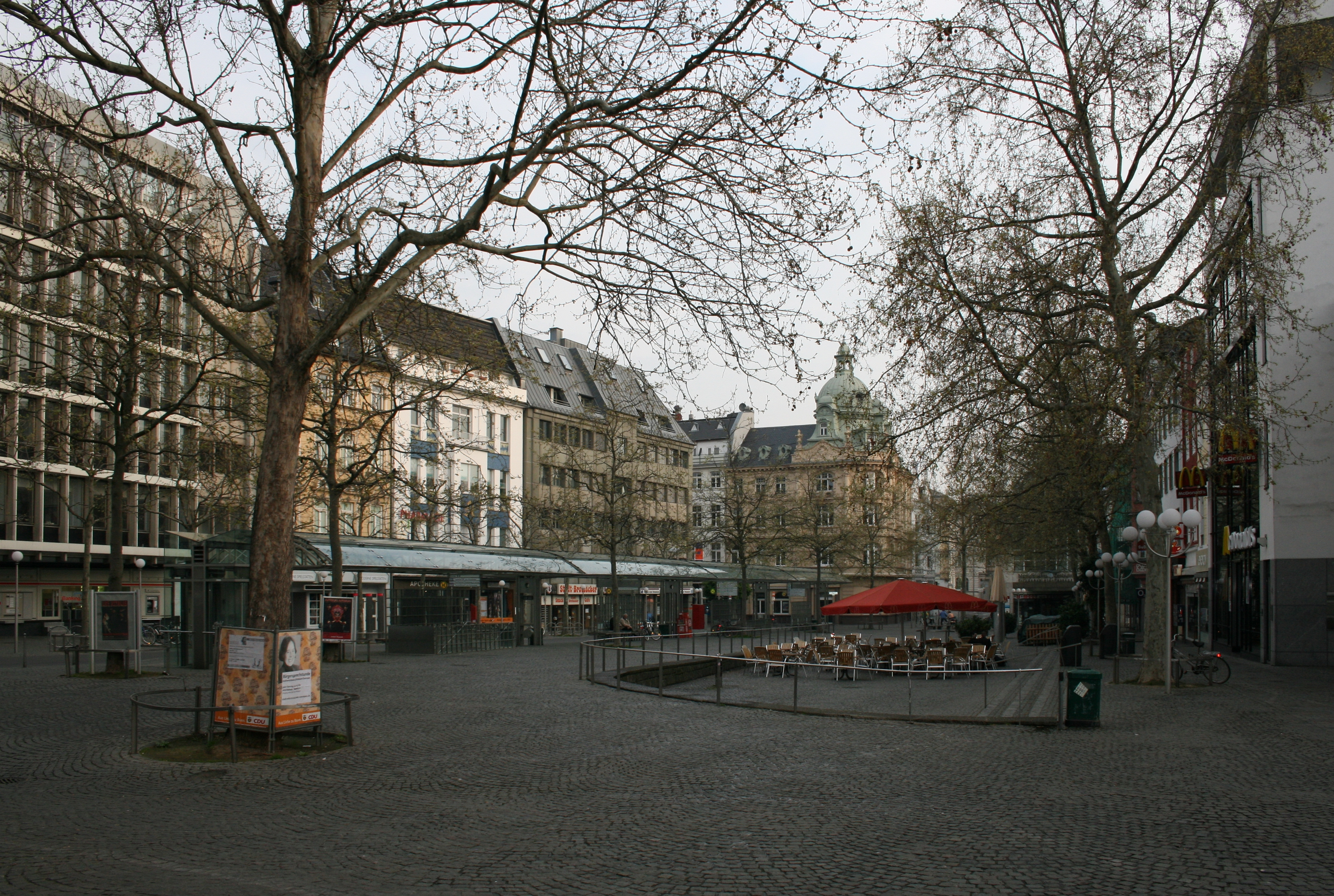 Bonn, Germany, Friedensplatz